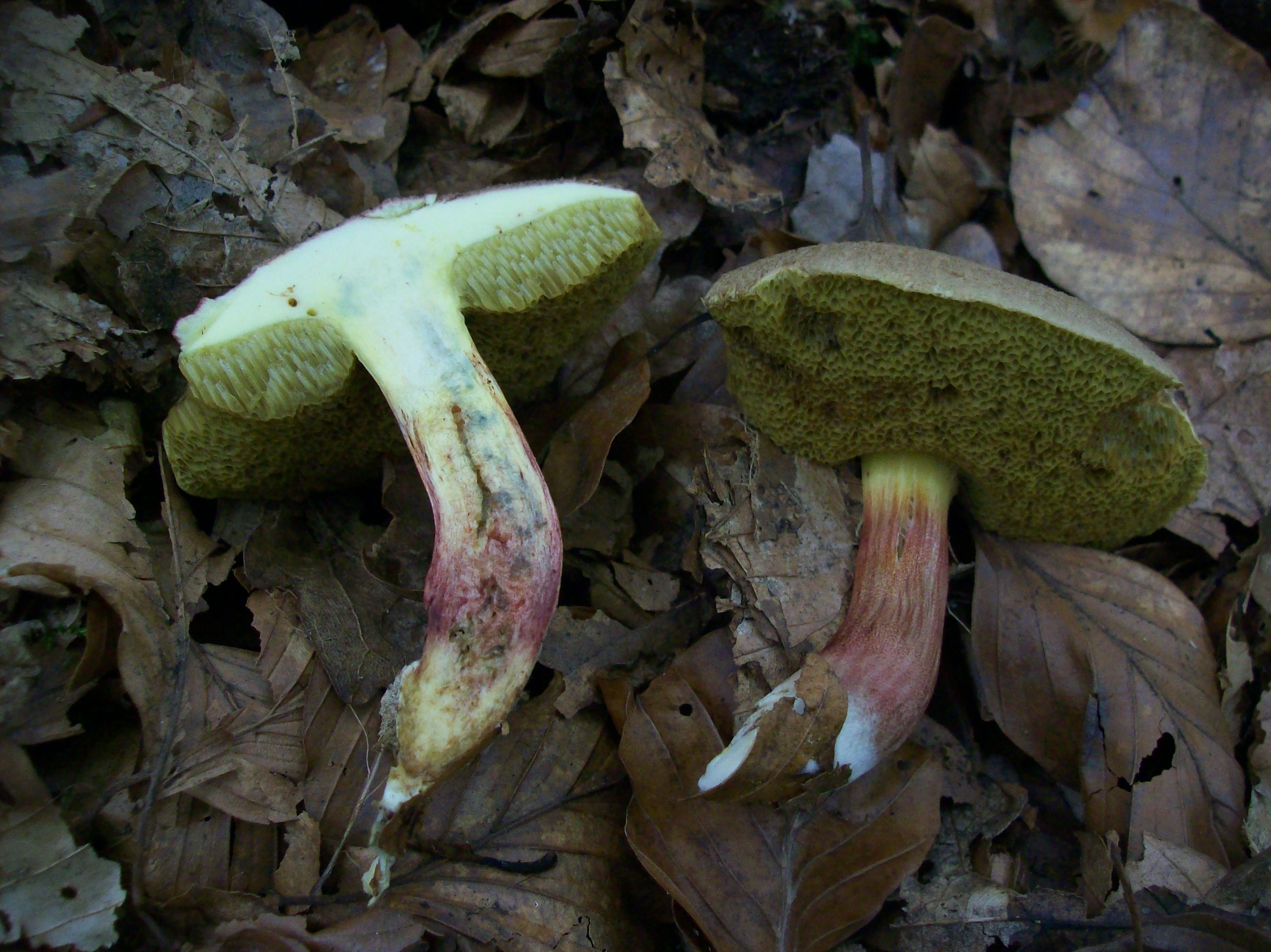 Das Stielfleisch des Gemeinen Rotfußröhrlings ist im unteren Teil rot. Es blaut nicht oder leicht in der oberen Hälfte.